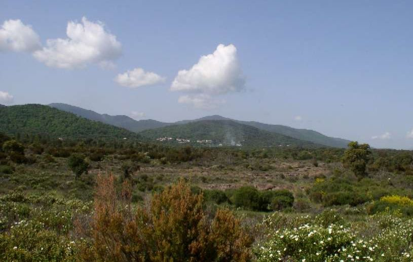 Vue de l'ouest du Massif des Maures - Auteurs Jodelet/LÃ©pinay